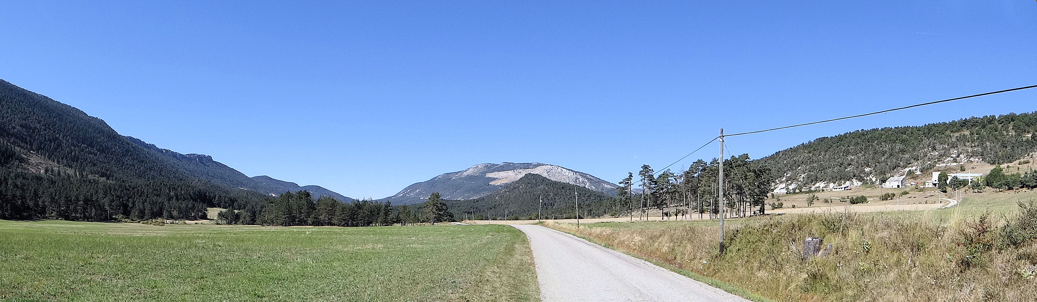 Saint-Auban - Le paysage sur la route entre Le Mas et Saint-Auban